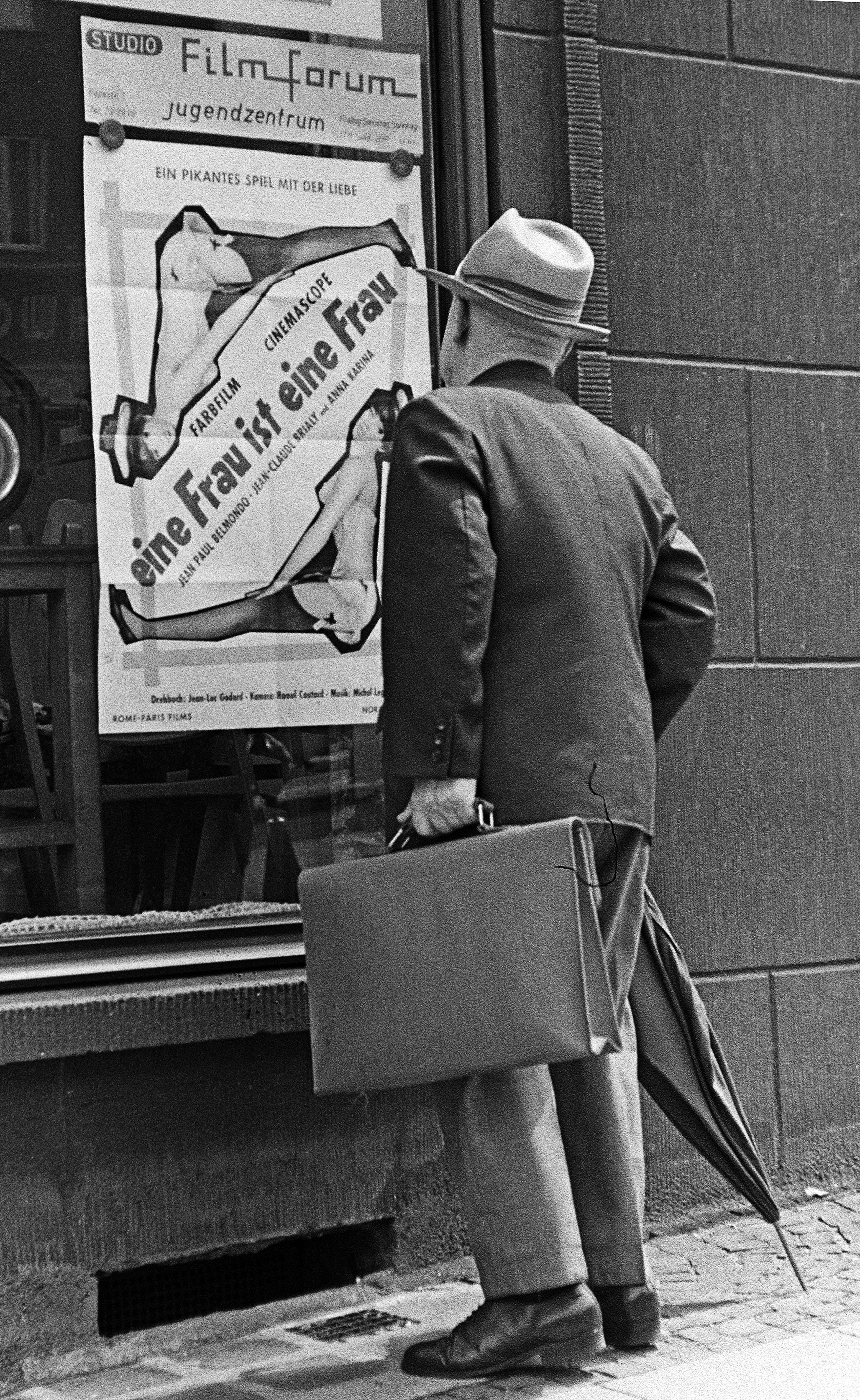 Studio Filmforum 1964 Essen JZE Pape Strasse 1 Plakatwerbung